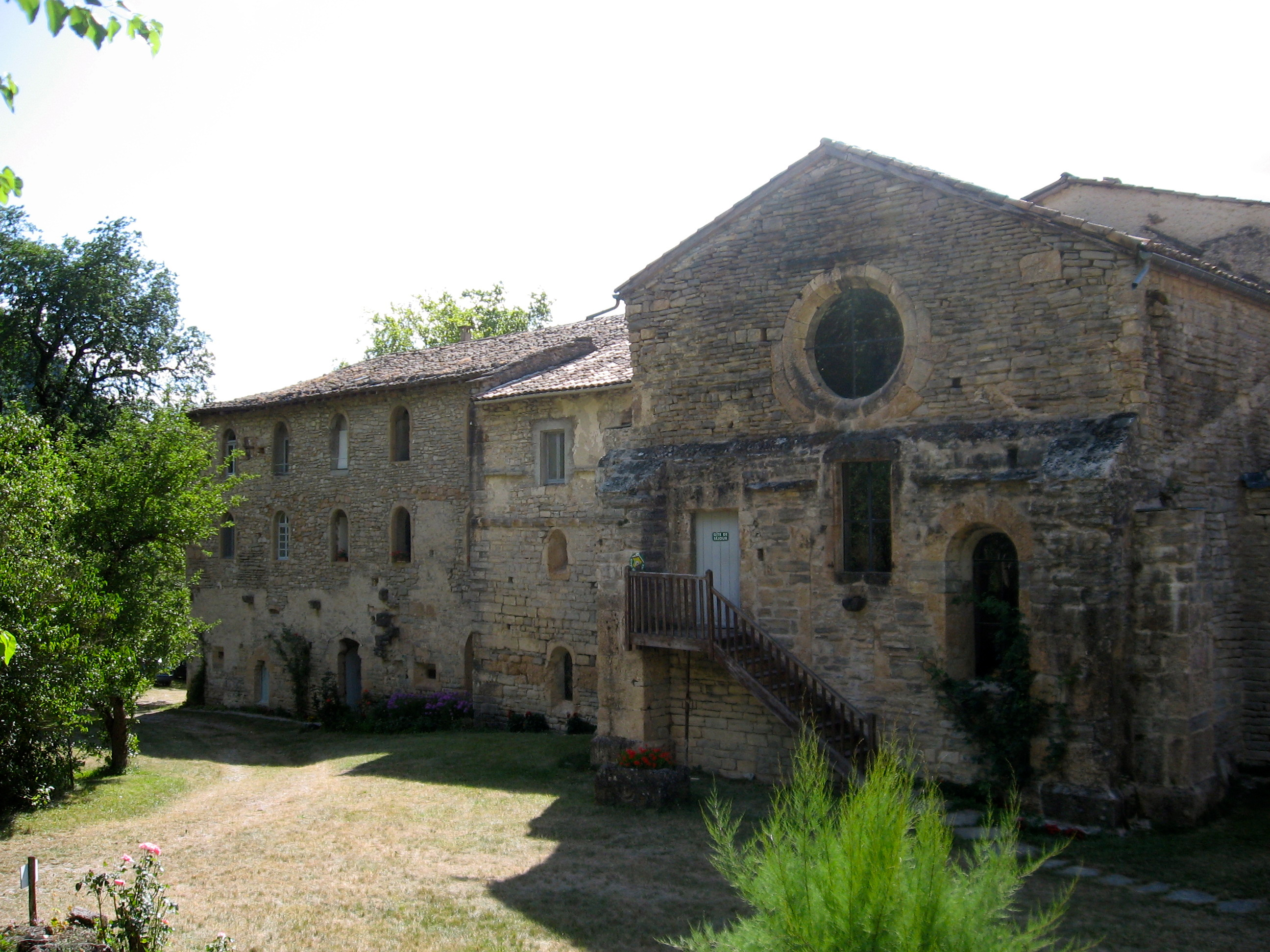 Abbaye de Valcroissant (Drôme)